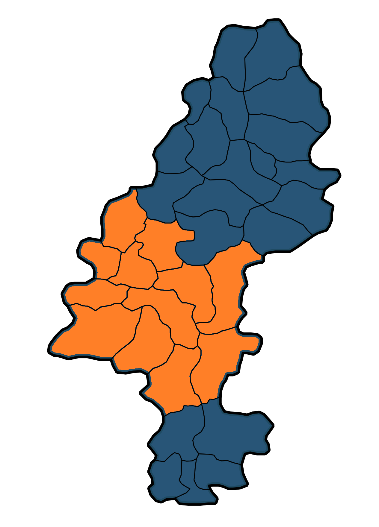 Mapa rejonu konińskiego diecezji włocławskiej